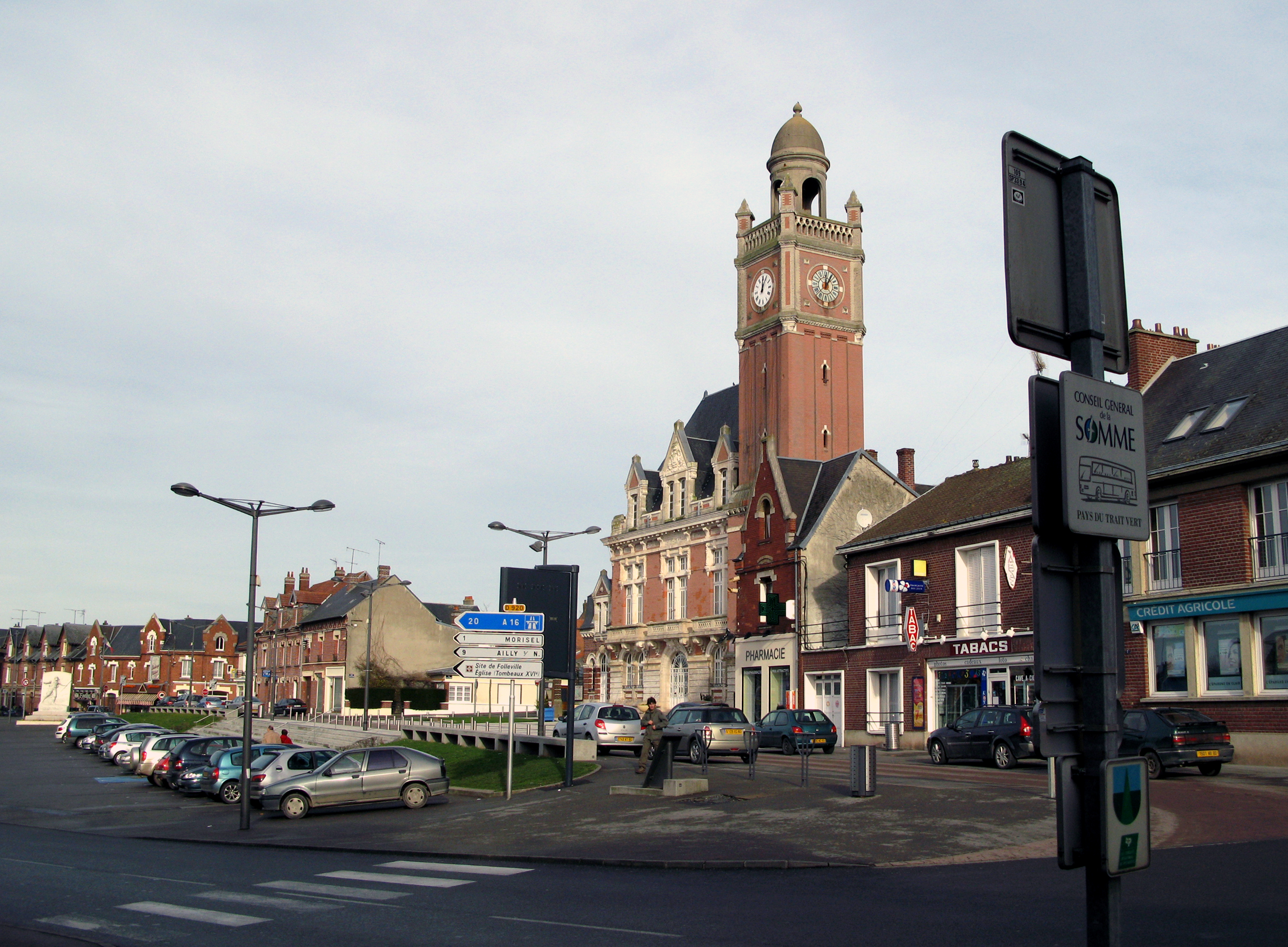 Moreuil (Somme, France) - La place centrale, avec le Monument-aux-Morts et l'Hôtel-de-ville.